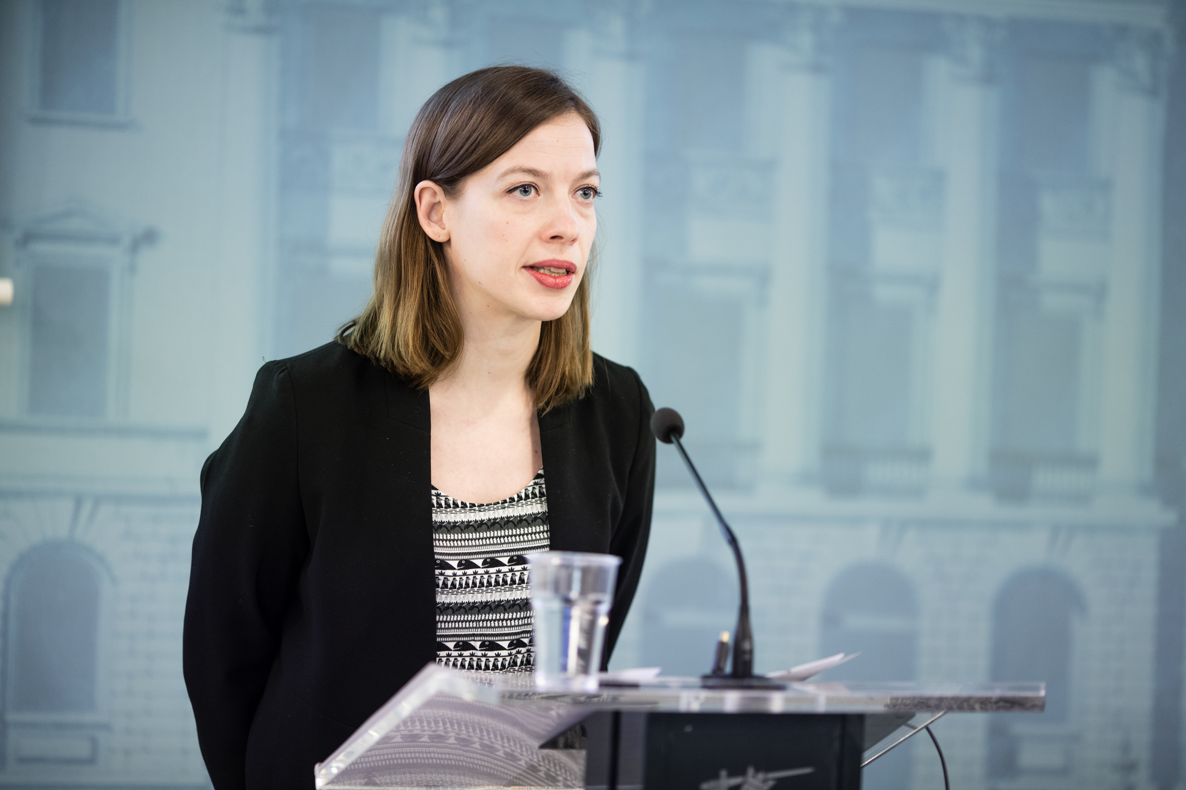 © Laura Kotila | valtioneuvoston kanslia